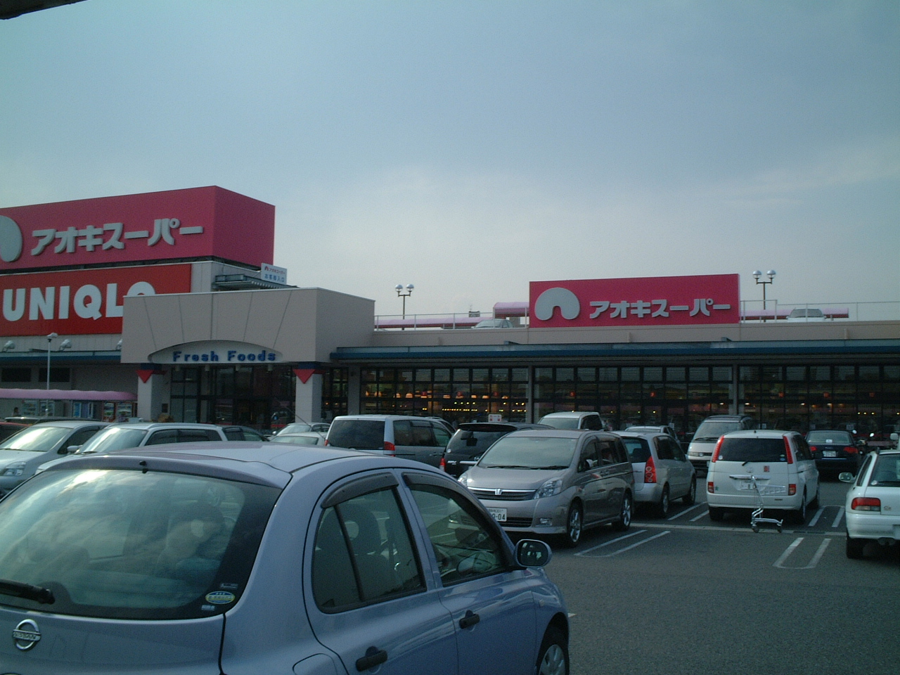 アオキスーパー今伊勢店の画像